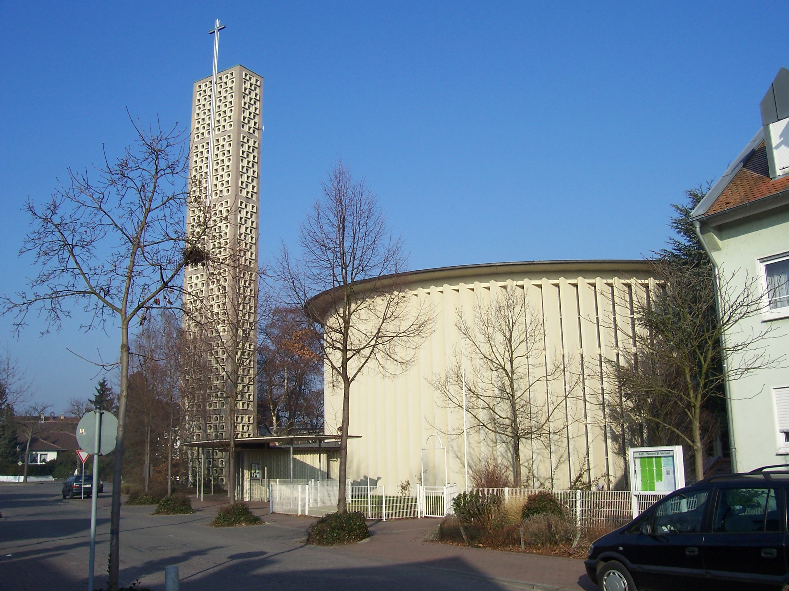 Die katholische Kirche St. Michael in Viernheim am 16. Januar 2005 My own photo